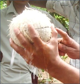 procès de partir un coco, foto feta prop de Kandy per J. Ollé el juliol del 2006